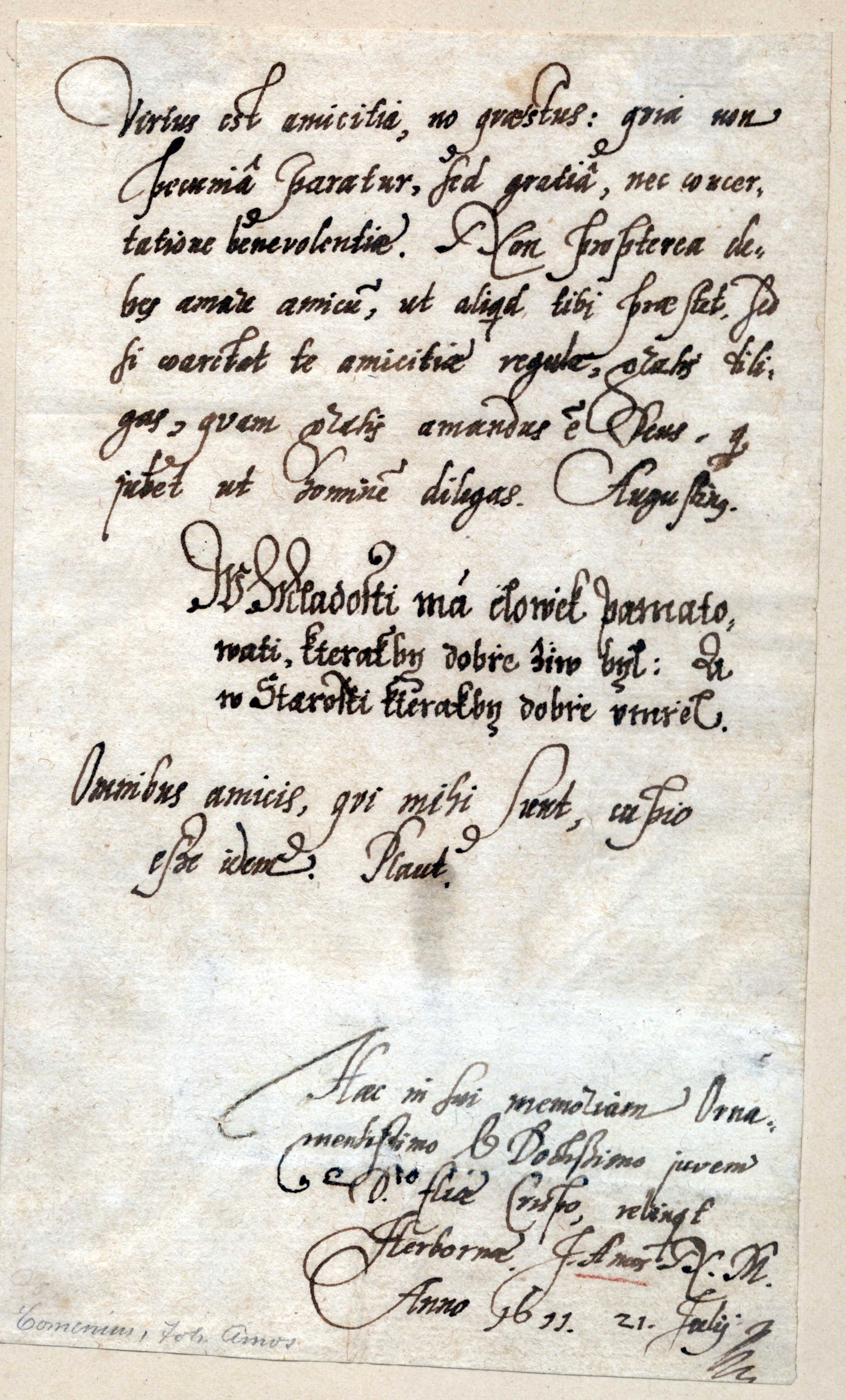 Nejstarší dochovaný rukopis J. A. Komenského z roku 1611. Sig. RKP-0385.238